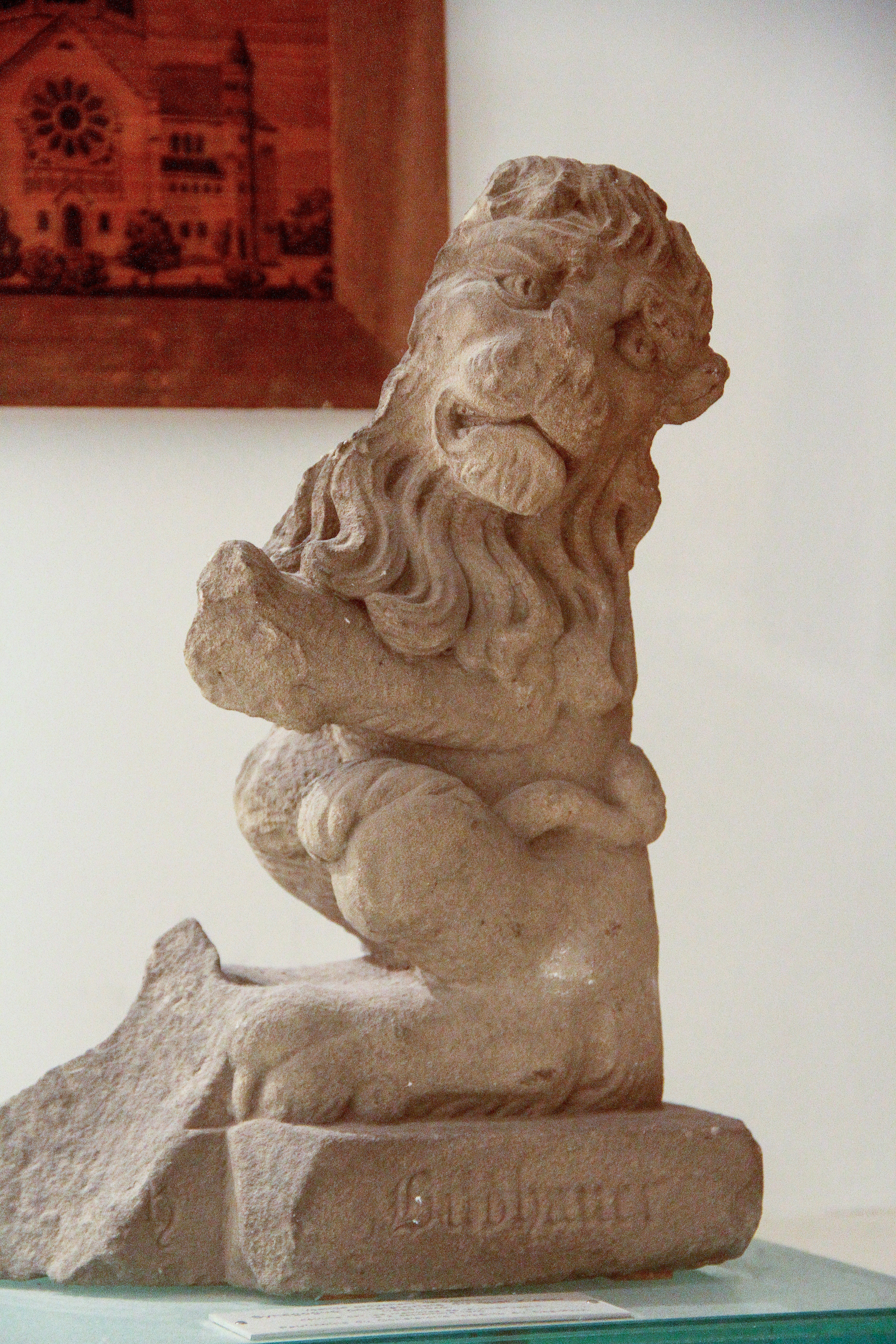 Vestige provenant de l’ancienne synagogue consistoriale du quai Kléber à Strasbourg. Patrimoine du Consistoire israélite du Bas-Rhin.